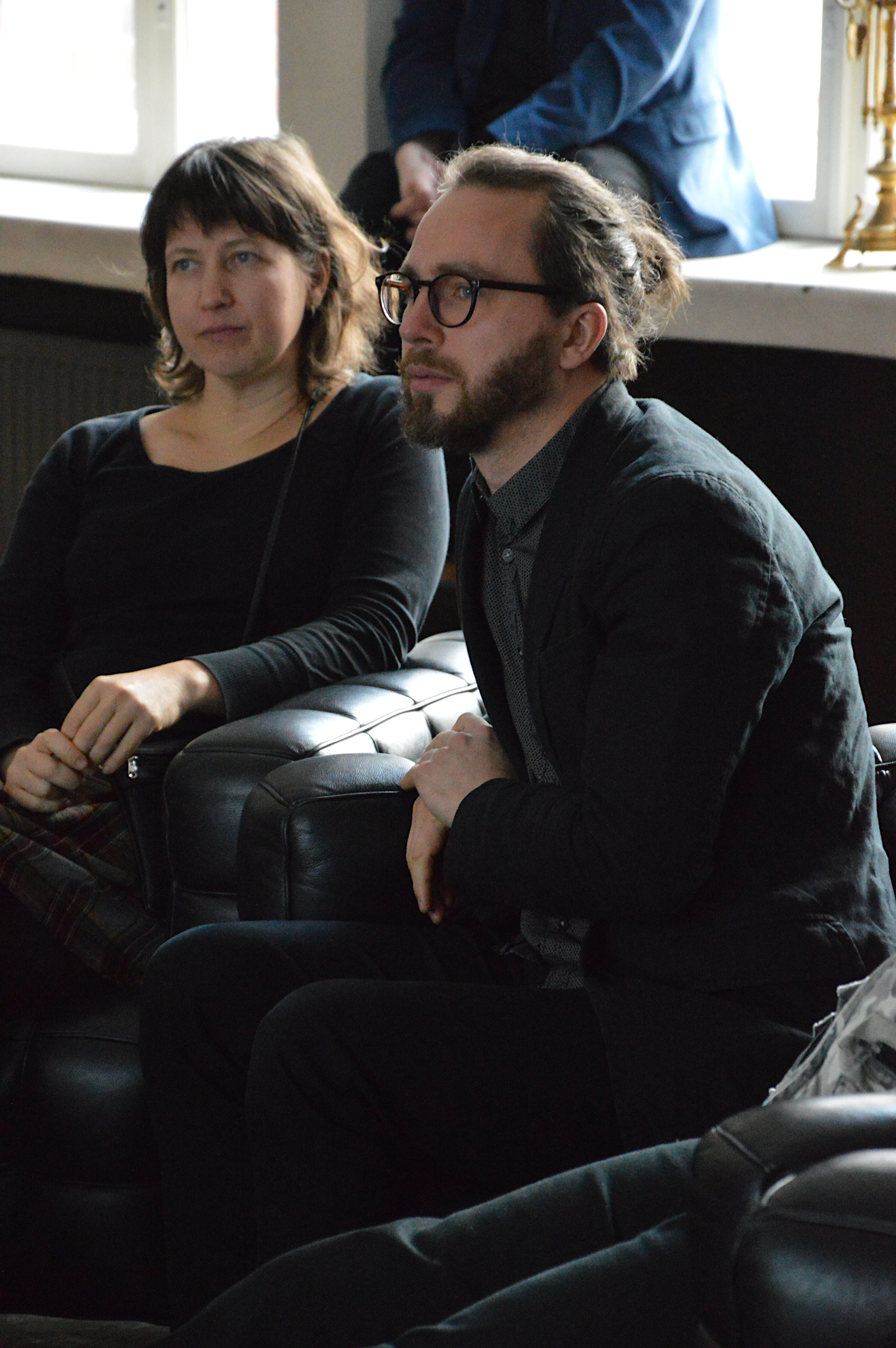 2019. aasta Eesti parimate teadusfotode väljakuulutamine.